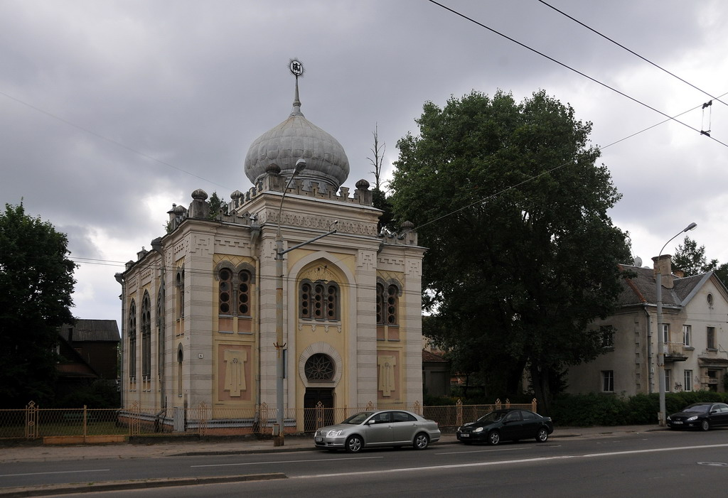 The Crimean Karaites are a community of ethnic Turkic adherents of Karaite Judaism in Eastern Europe. Originally centered in Crimea, Karaim were established in Lithuania and elsewhere in Europe from late medieval times. De Karaïm vormen een zeer kleine etnische minderheid in Litouwen die bestaat uit de nazaten van Tartaarse Karaïeten die in de 14e eeuw door Vytautas de Grote van de Krim naar zijn rijk werden gehaald. Hun culturele centrum is Trakai, de toenmalige Litouwse hoofdstad.